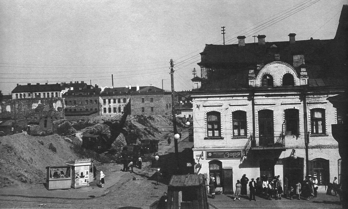 Мінск. Камсамольская 17 (XX)